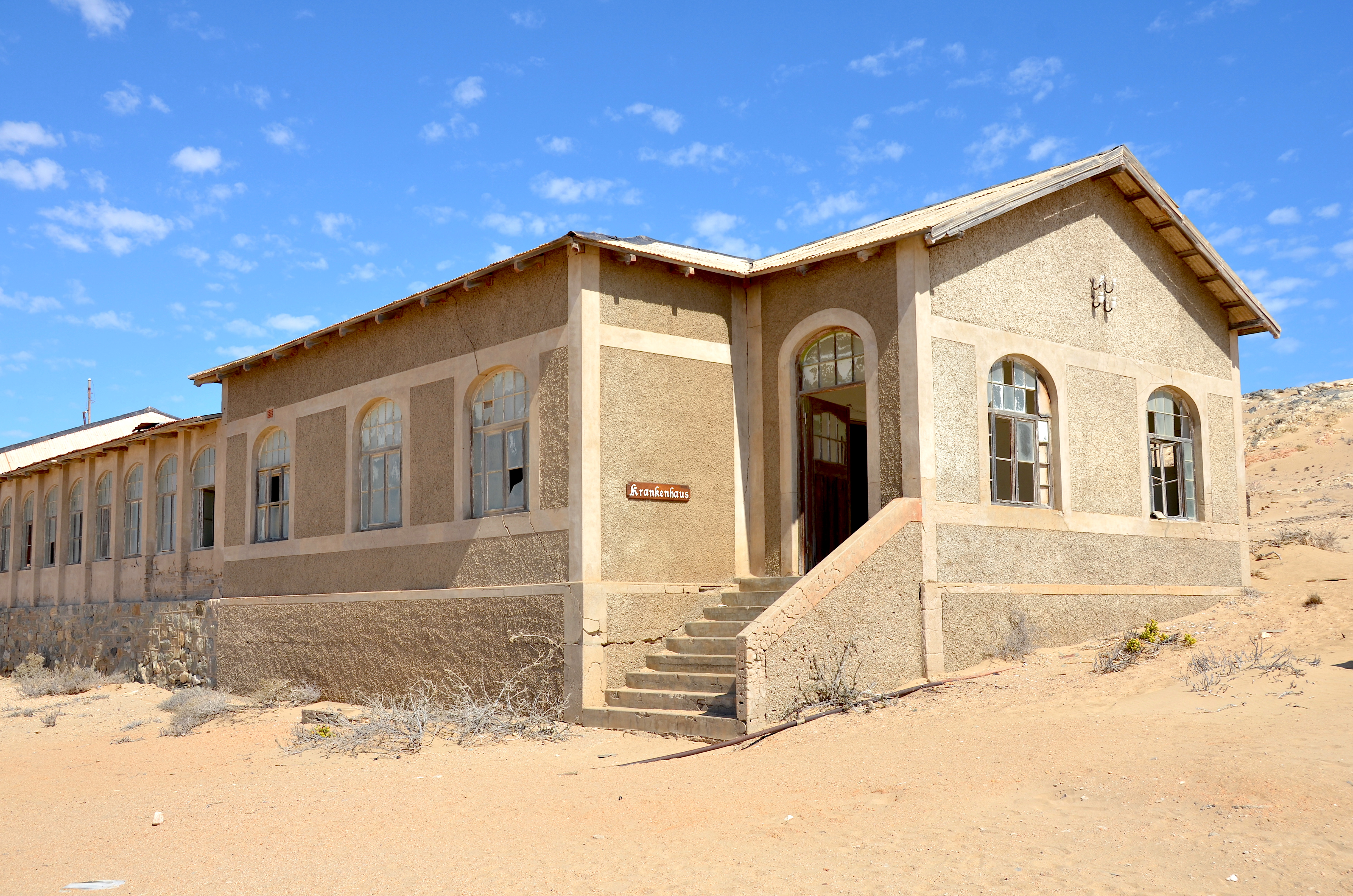 Krankenhaus in Kolmannskuppe bei Lüderitz (Namibia)